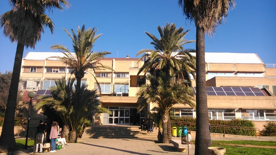 Edificio Guillem Colom (UIB)